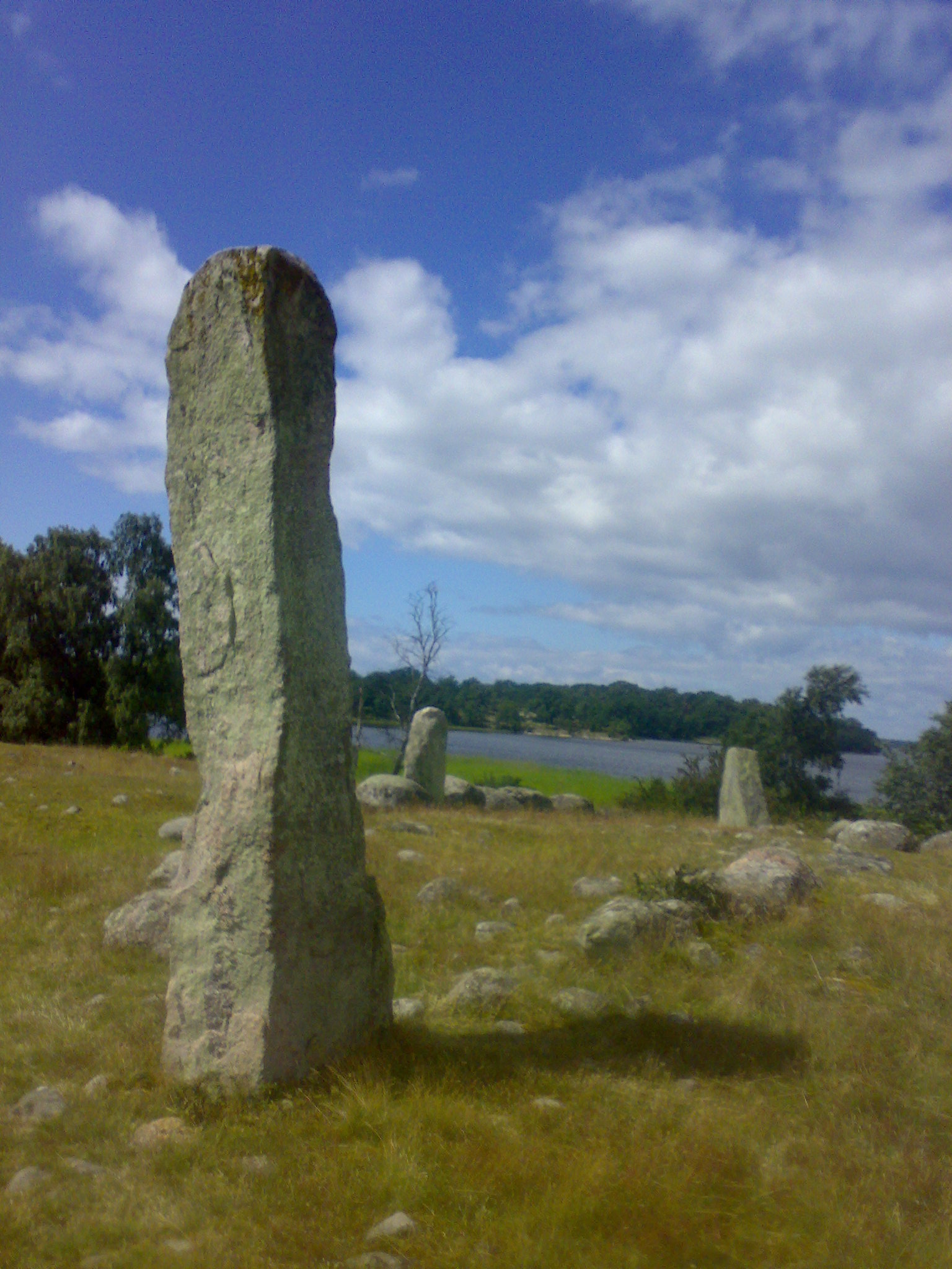 Hjortahammar, Blekinge, Sweden.